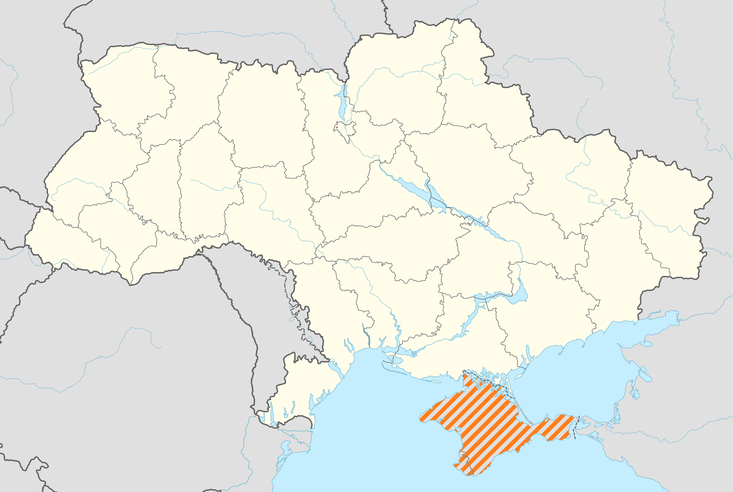 Карта, Національна гвардія України, Кримське територіальне управління